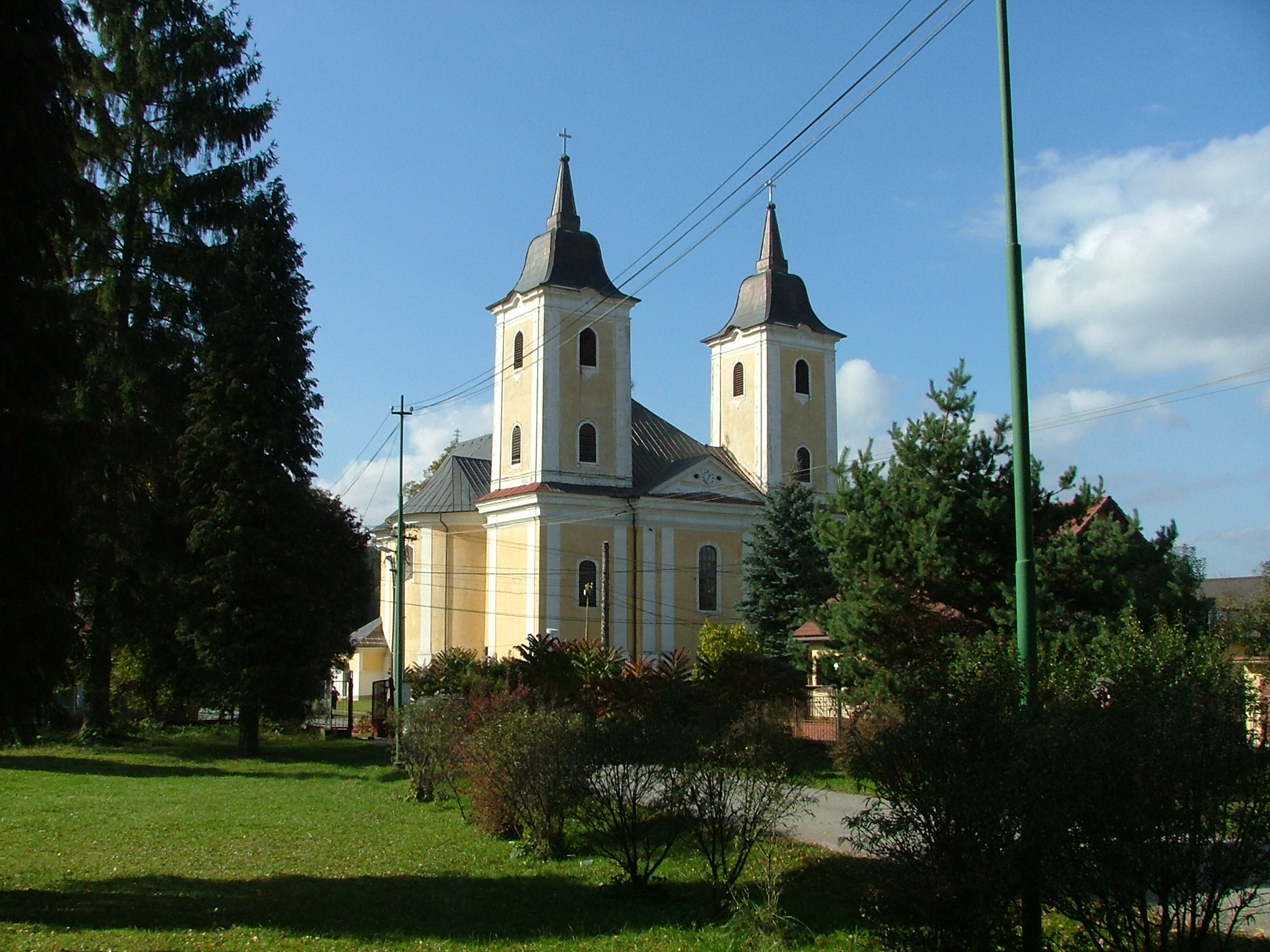 Kostol Višňové